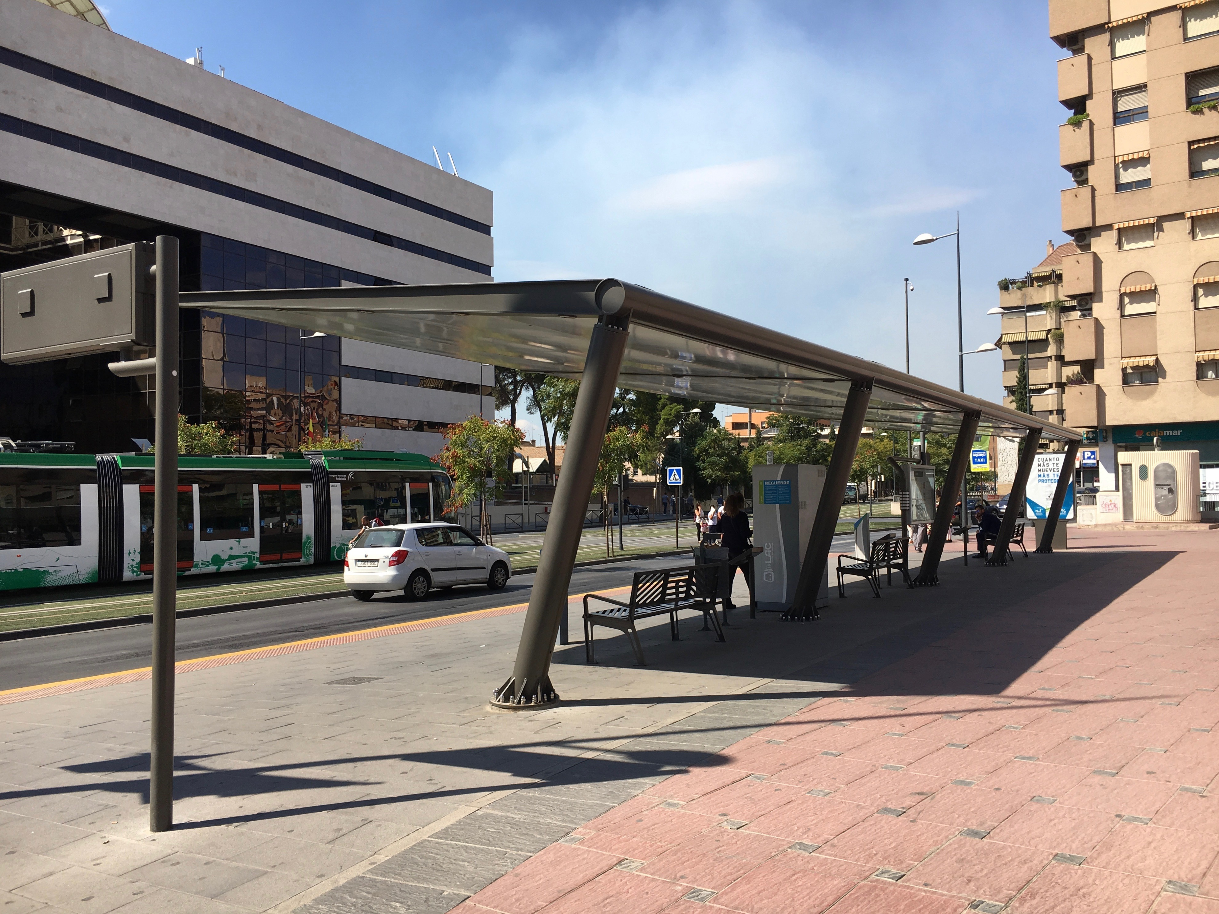 Intercambiador de la Línea de Alta Capacidad de Granada (LAC). Al fondo, una unidad del Metro de Granada